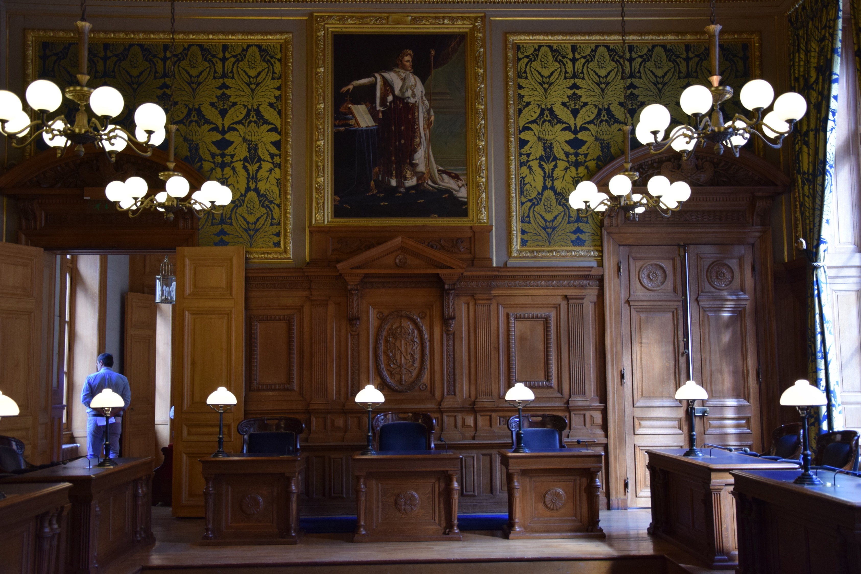 Salle d'audience de la chambre commerciale de la Cour de cassation. premier étage de la Cour de cassation au palais de justice de Paris. .